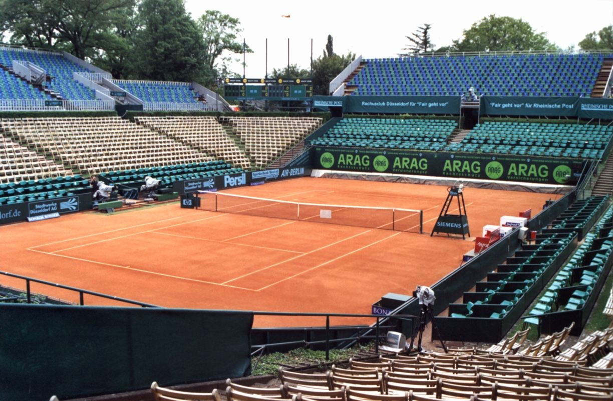 Rochusclub Düsseldorfer Tennisclub e. V., Düsseldorf, Germany (Centre-Court I)